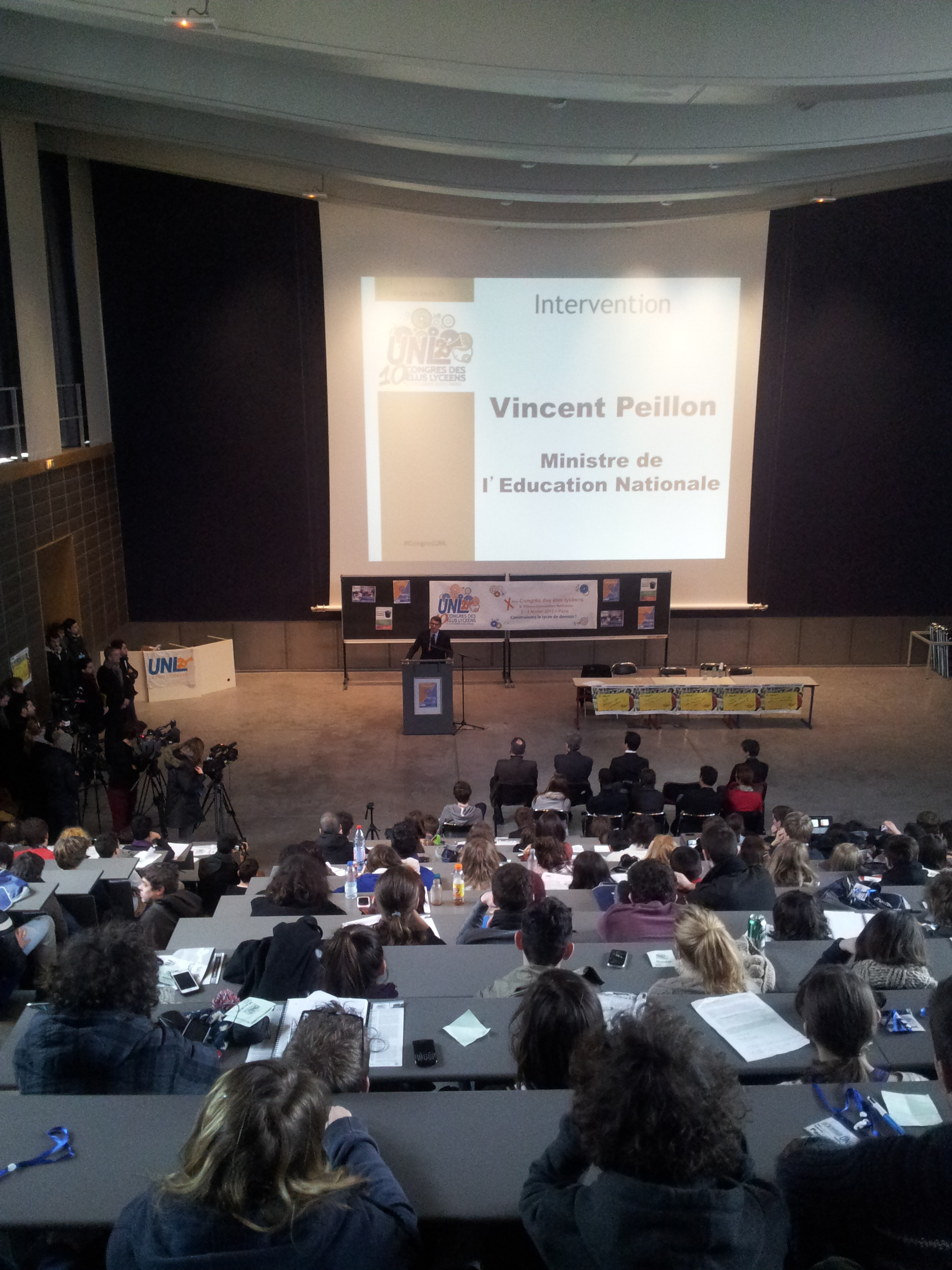 Intervention de Vincent Peillon, ministre de l'Éducation nationale, au 10e congrès des élus lycéens organisé en 2013 par l'Union nationale lycéenne à Jussieu (Paris).